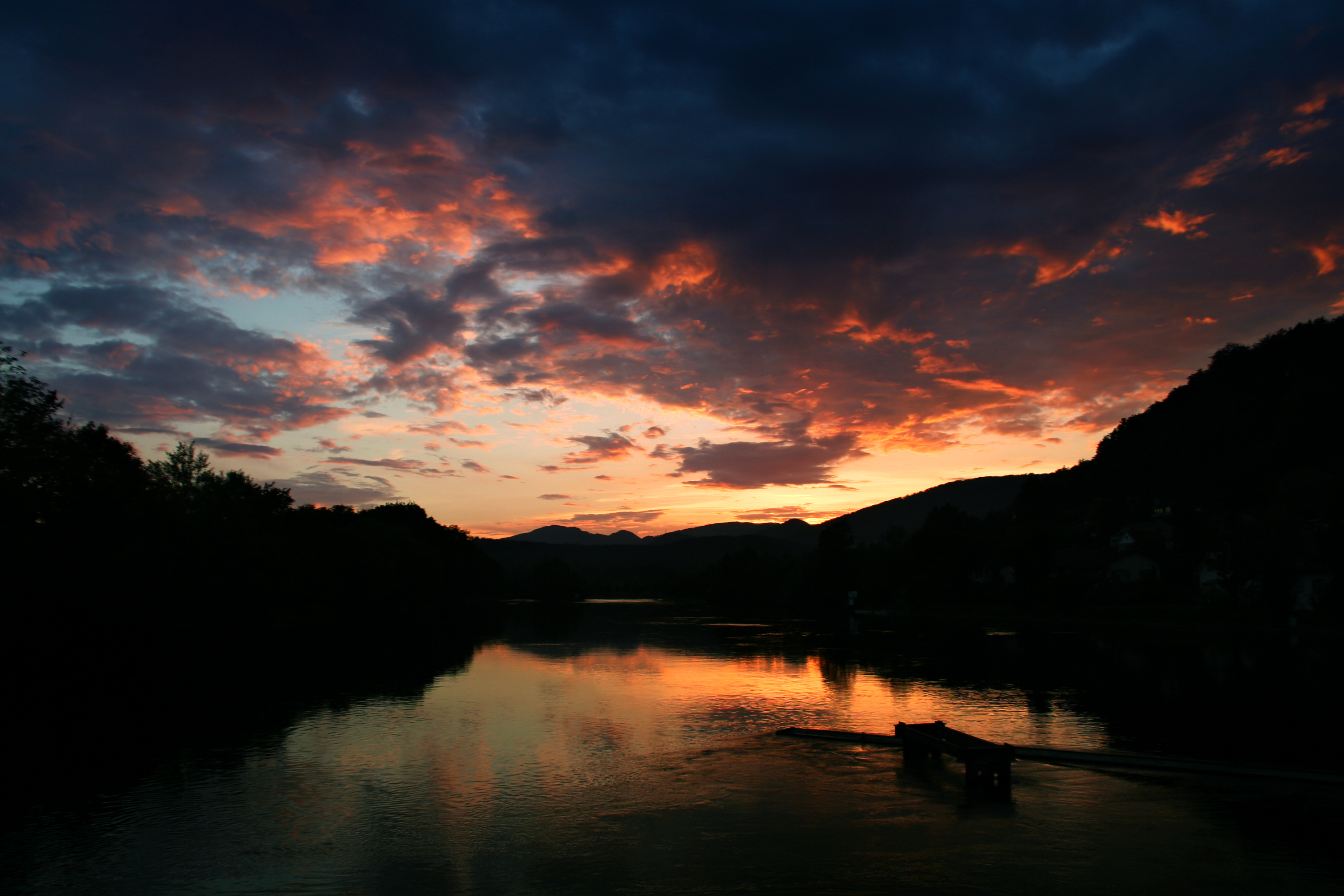 Aare in Aarau, Switzerland